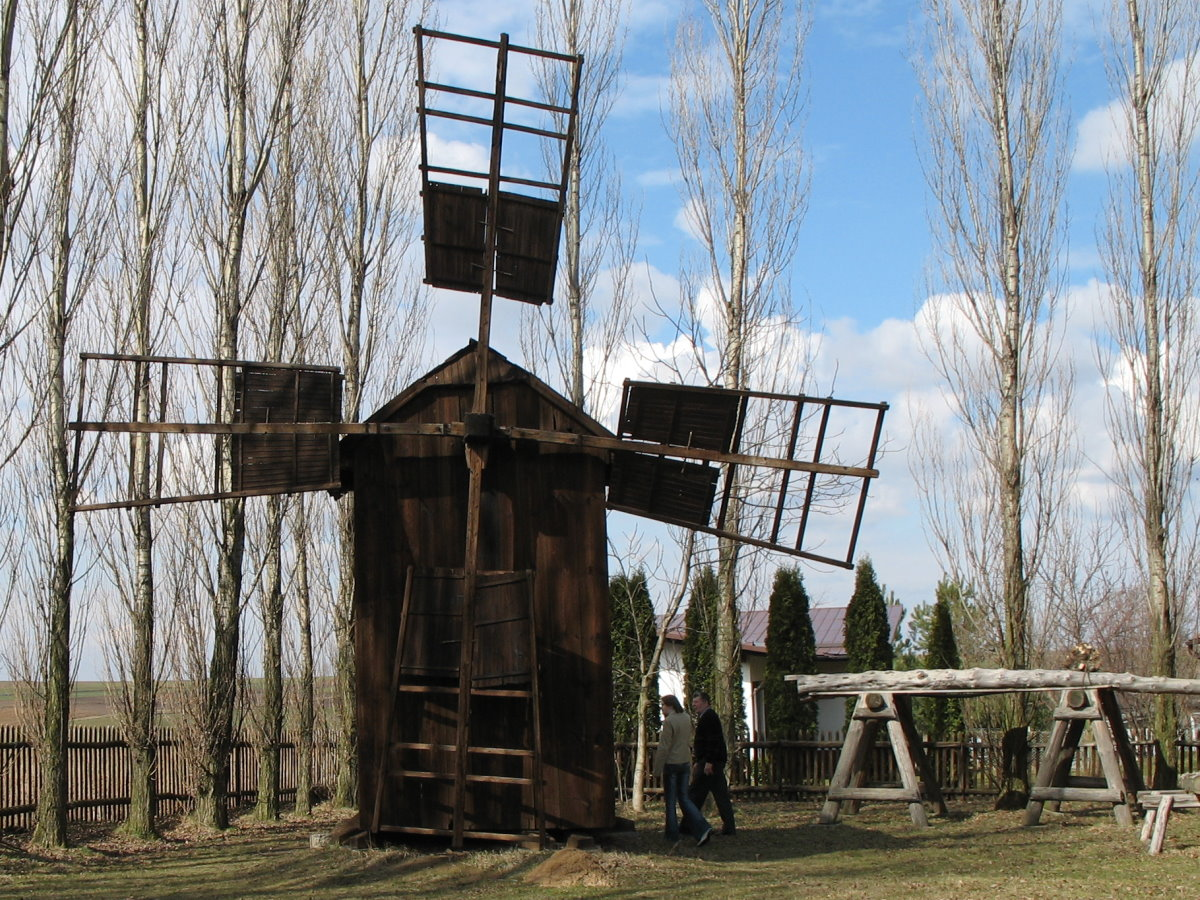 Muzeum Wsi Markowa (Polska) - wiatrak "koźlak".